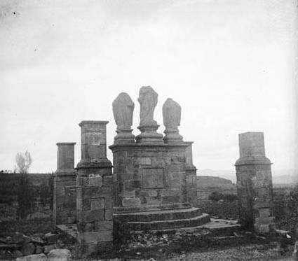 Monument de Sant Bernat a l'Espluga de Francolí. Joaquim Bordons i Wehrle (1906-10)